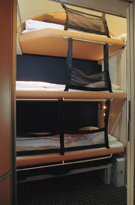 City Night Line: Schlafwagen Comfortline